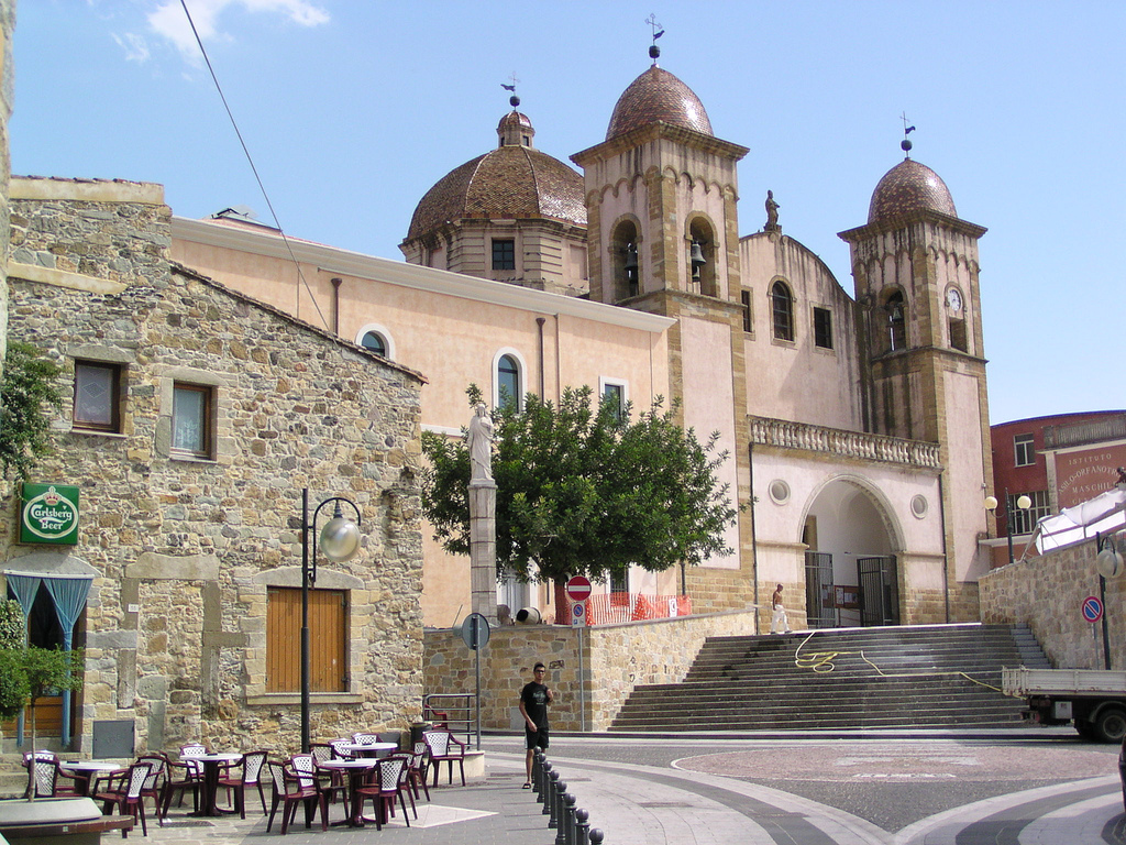 Cattedrale di Ales (OR) Sardinia